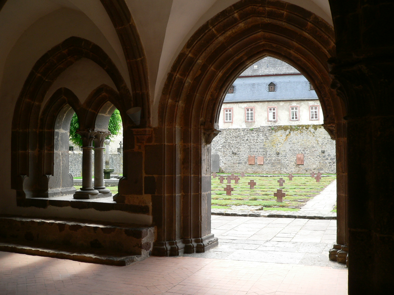 Eingang zum Kapitelsaal Kloster Arnsburg bei Lich, Hessen, Germany